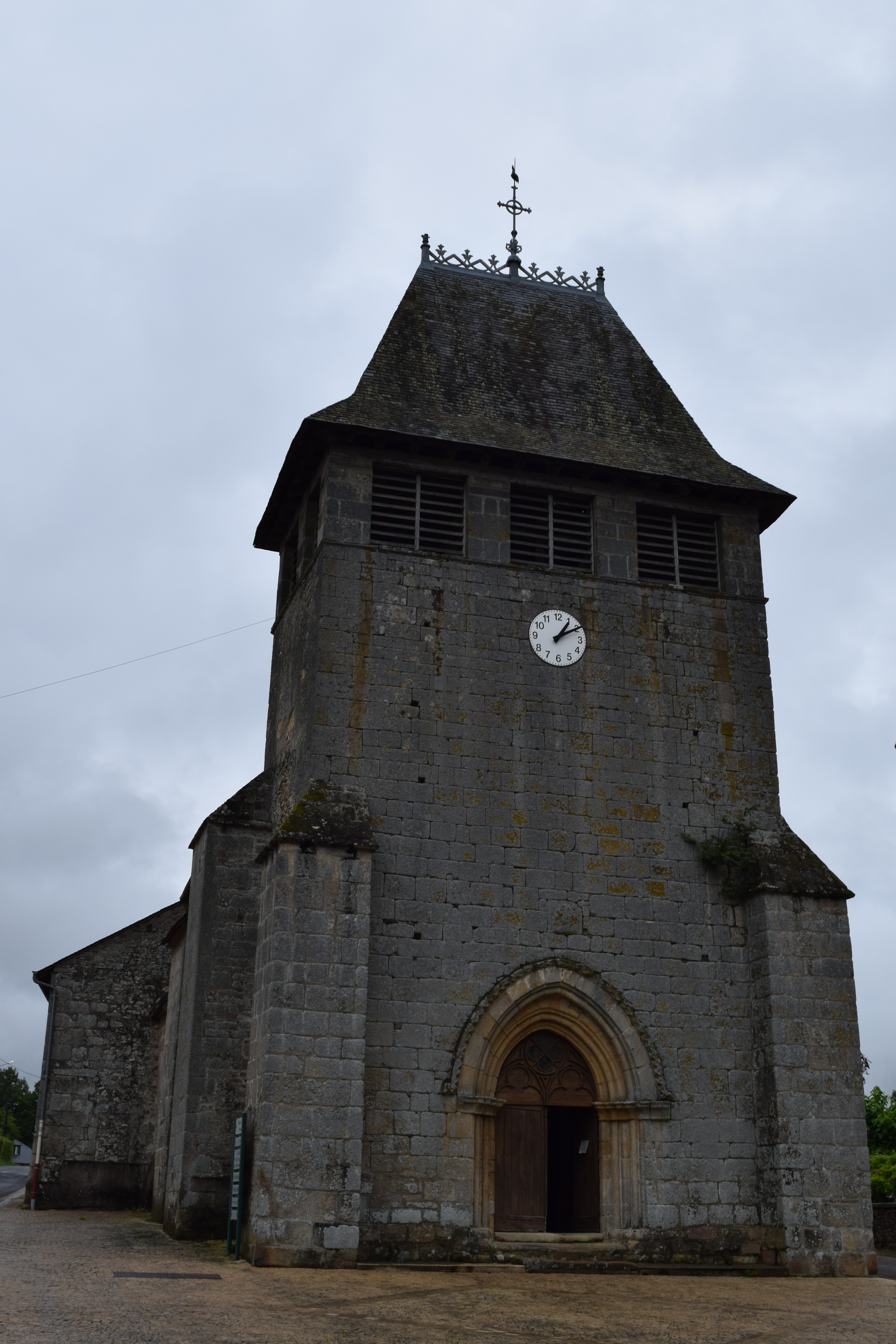 Église Saint-Sauveur de Saint-Salvadour .